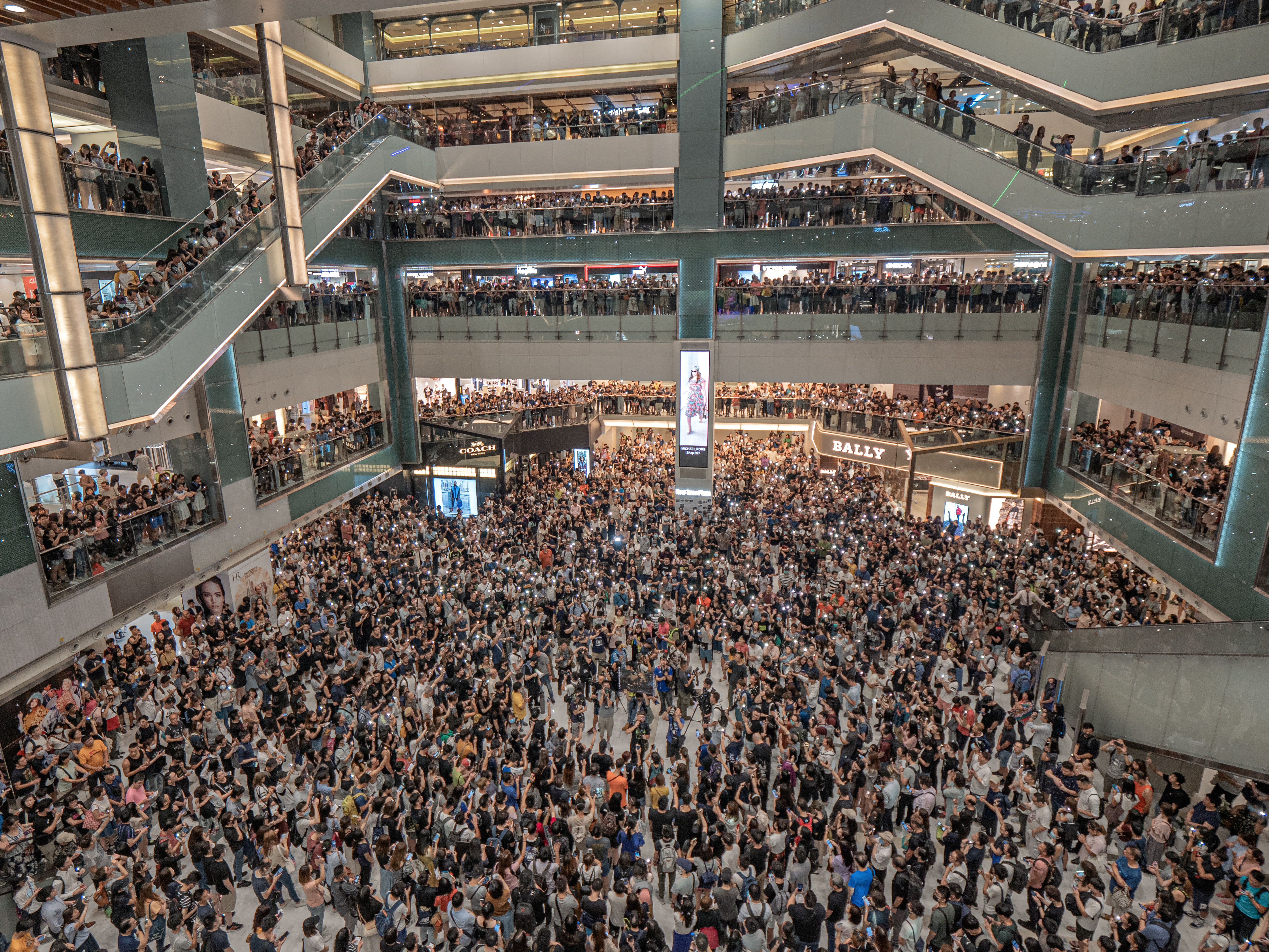 20190911 Shatin